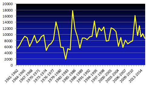 tabella degli abbonamenti all'Atalanta dal 1961 fino al 2011